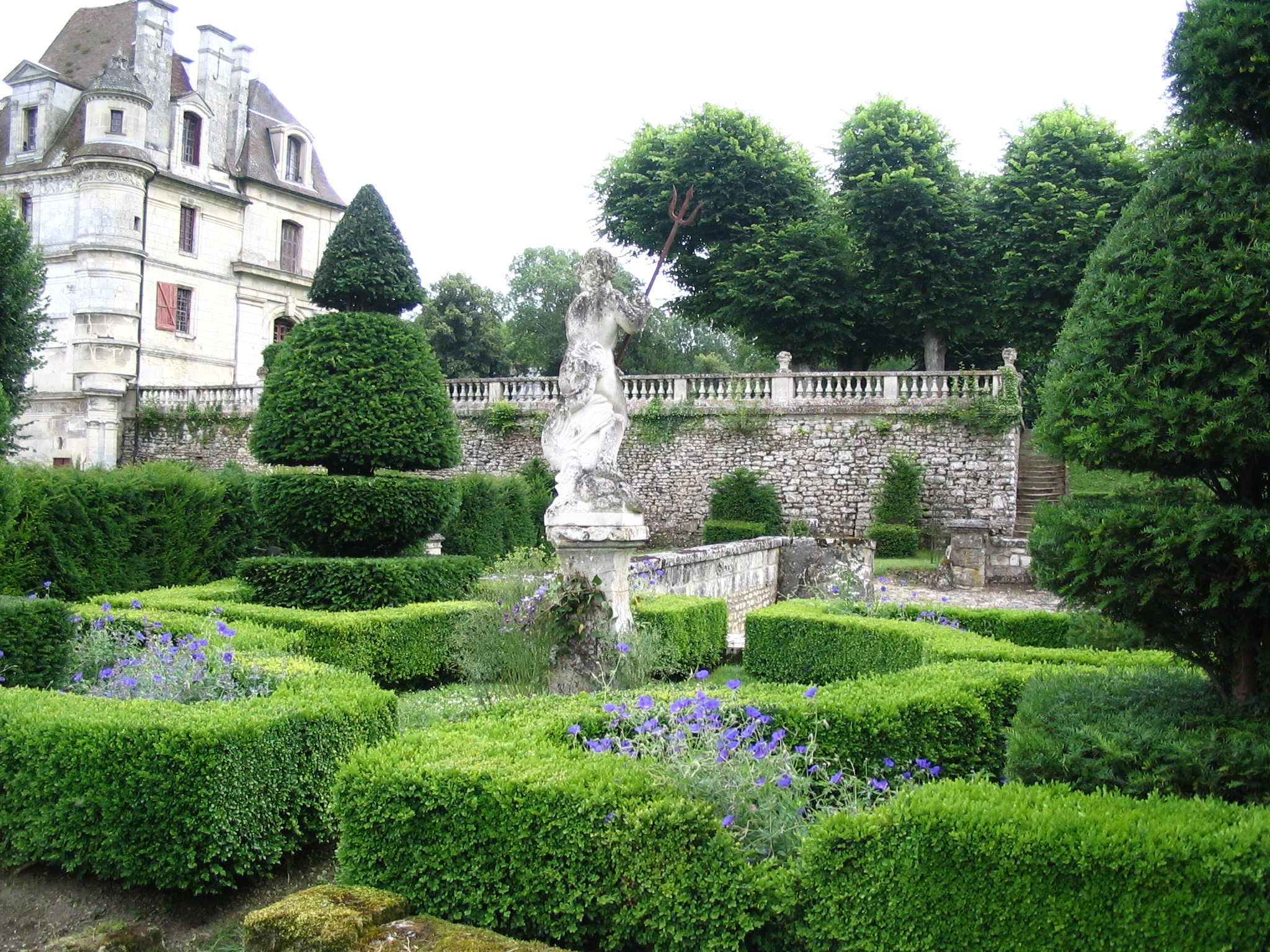 Jardin du chateau d'Ambleville, Val d'oise, France